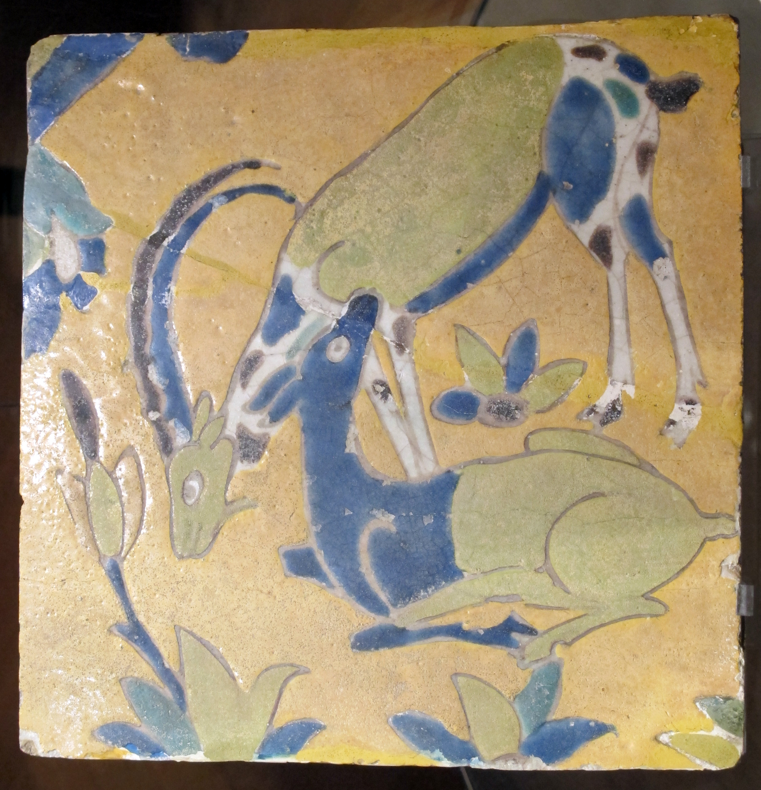 Iran, mattonella con gazzelle, xvi-xvii sec